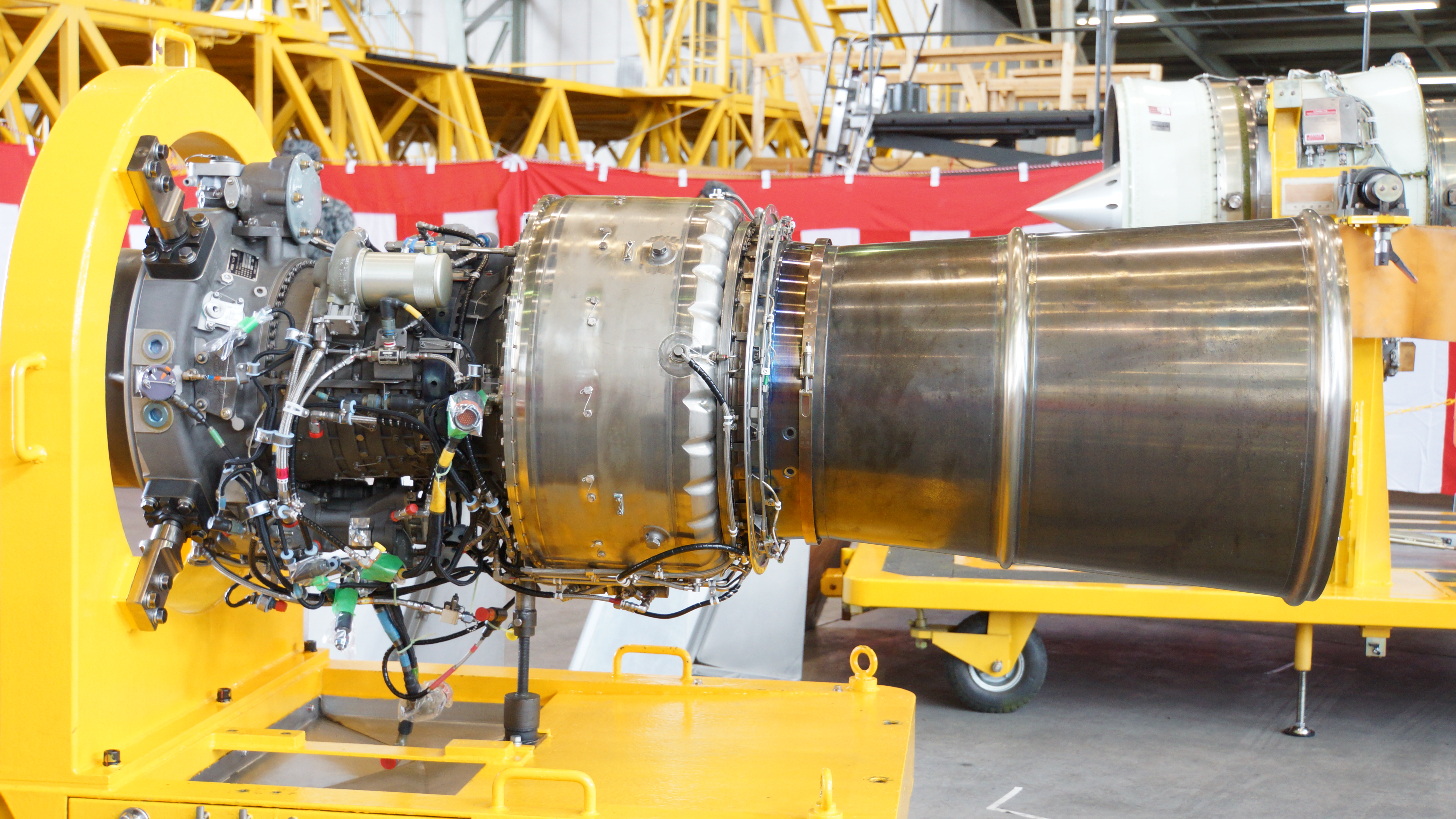 川崎/ハネウェル T55-K-712ターボシャフトエンジン（CH-47J（LR）用） 左側面。2016年3月13日 航空自衛隊小牧基地にて。